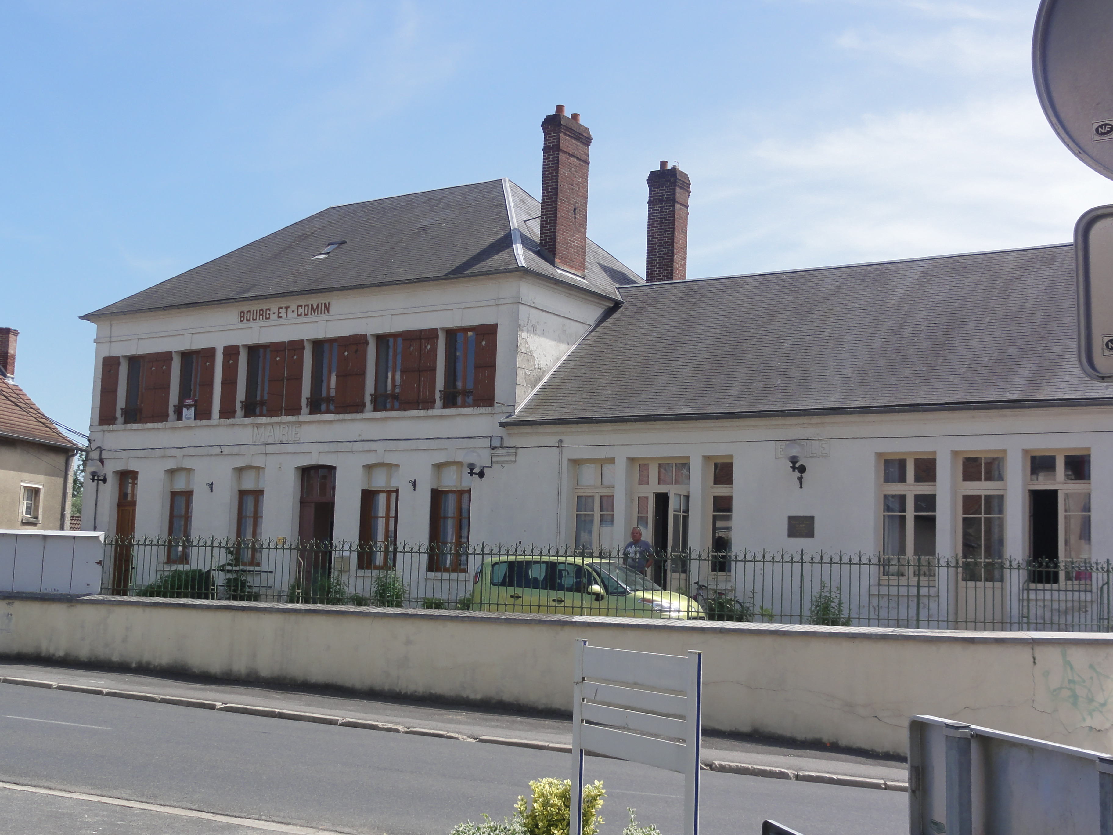 Bourg-et-Comin (Aisne) Mairie